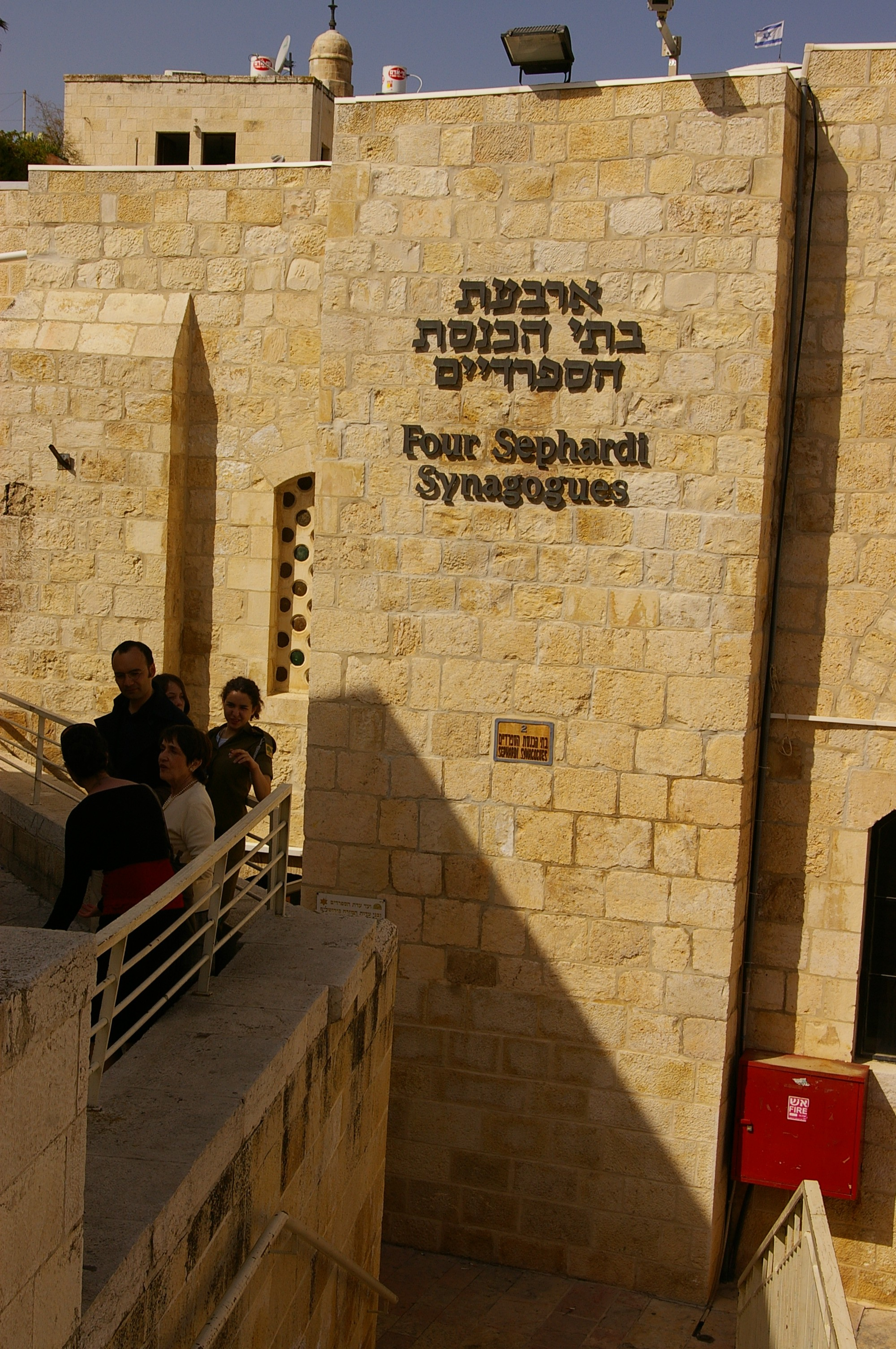 Vieille ville de Jérusalem - Quartier juif - Quatre synagogues sephardi de Jérusalem, cet endroit se trouve sur le circuit de visite fléché סיורובע (étape 2).